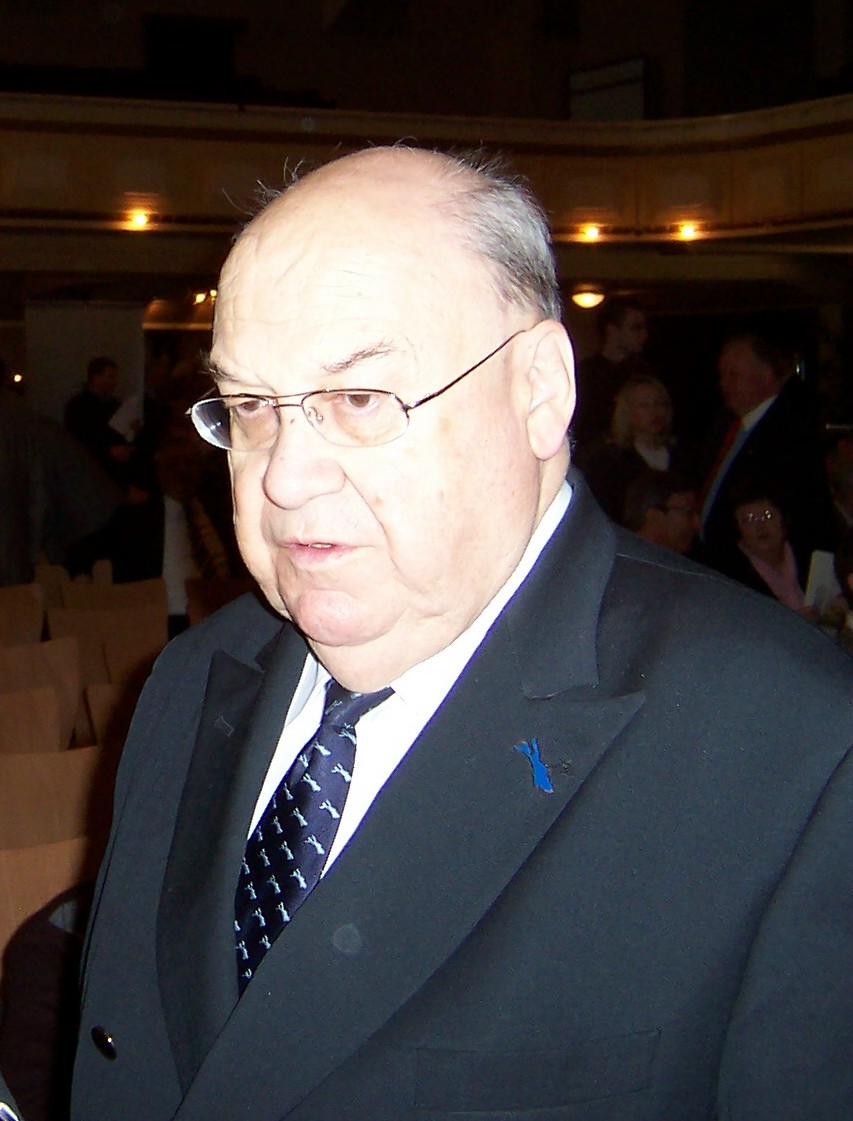 Ernst Mühlemann, alt-Nationalrat (FDP/TG)